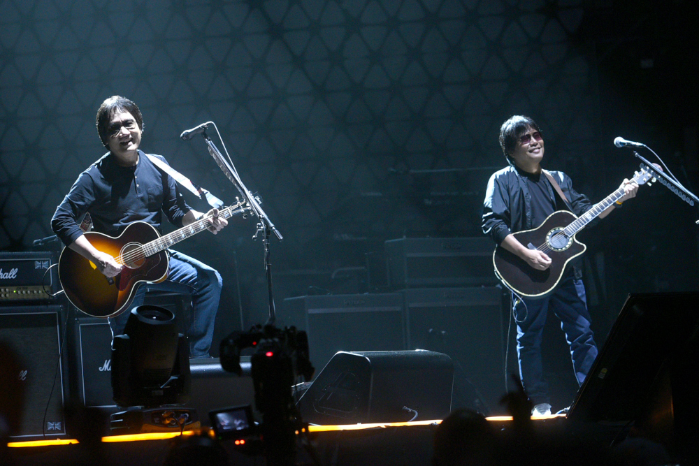 คอนเสิร์ต อัสนี-วสันต์ 30 ปี สวัสดีครับ